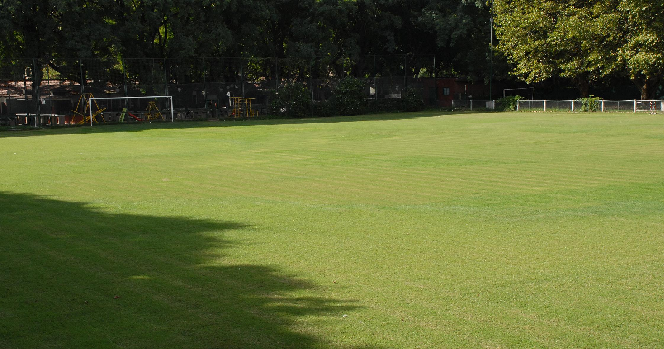 Cancha 1